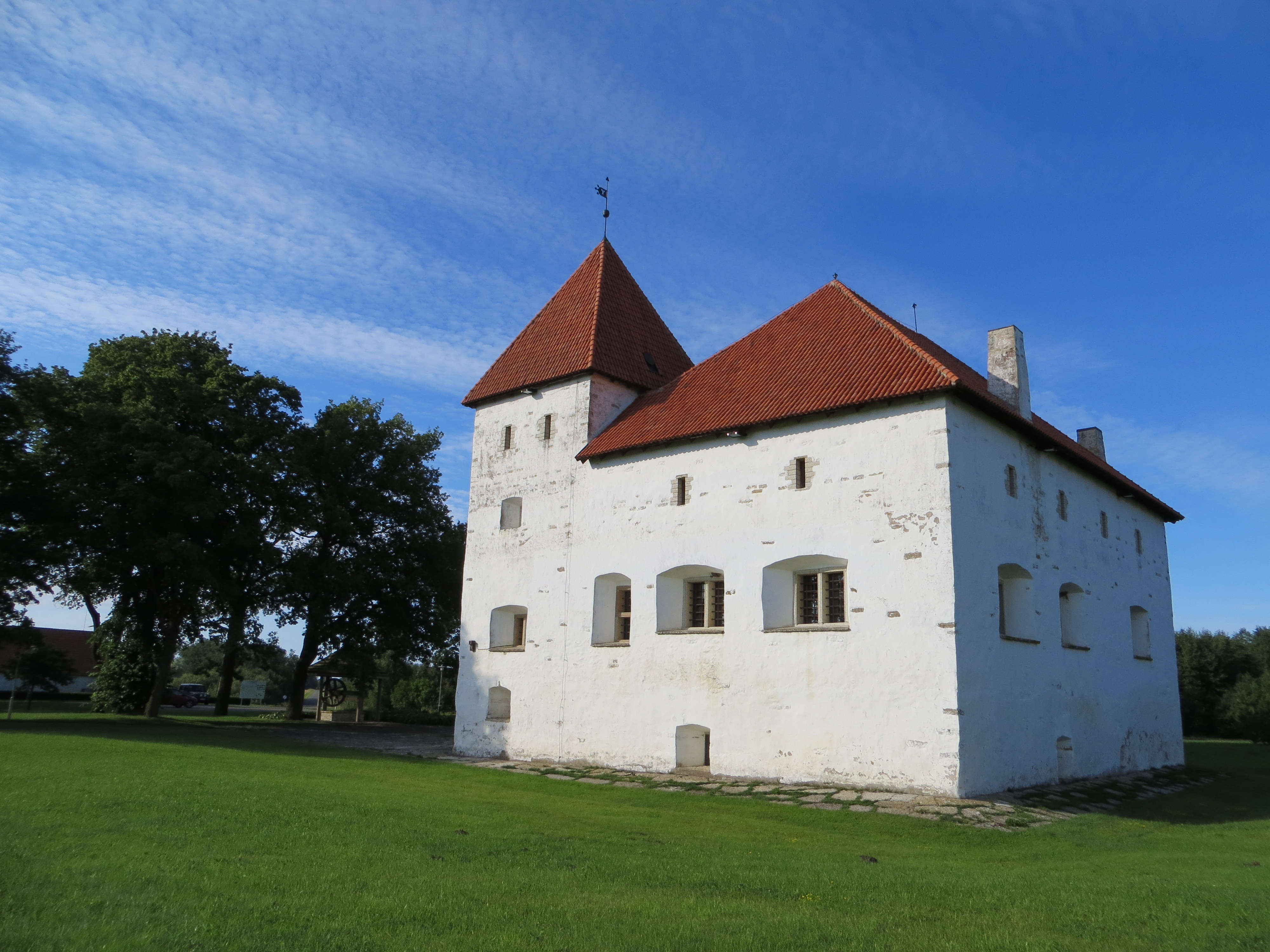 Purtse kindluselamu